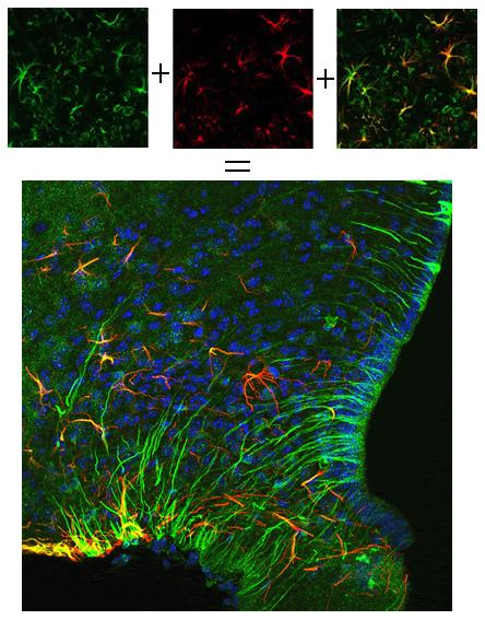 Construção de Uma Imagem com Microscopia Confocal - Astrócitos. Astrócitos (verde) que exprimem o receptor da leptina (vermelho). Onde se localizam ambos observa-se marcação laranja. Núcleos - azul. Pan et al. Endocrinology: Blood Brain Barrier, 2008.